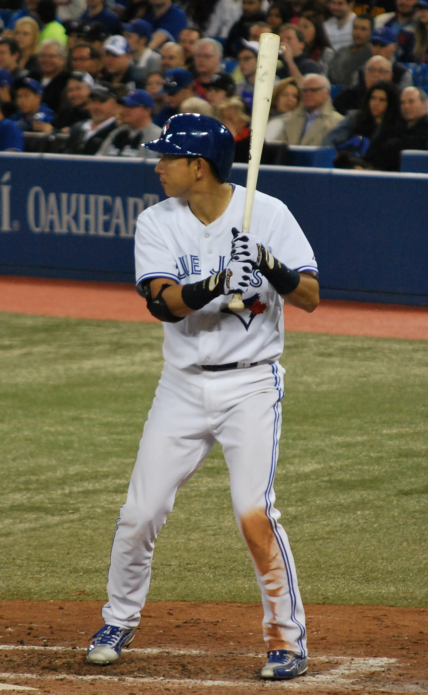 Munenori Kawasaki